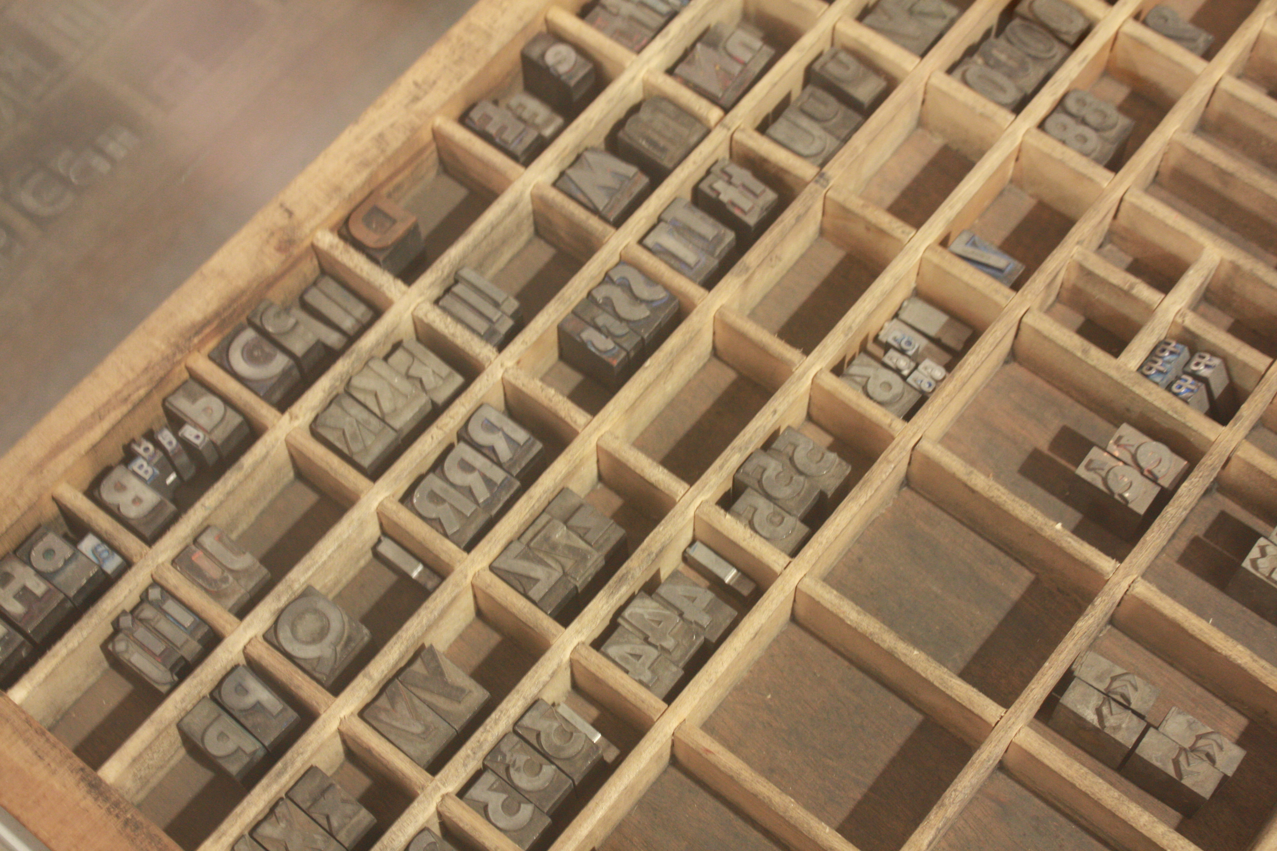 Provincia de Huesca, España.